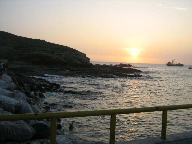 Ocaso en Puerto Culebras, Huarmey, Ancash, Perú.